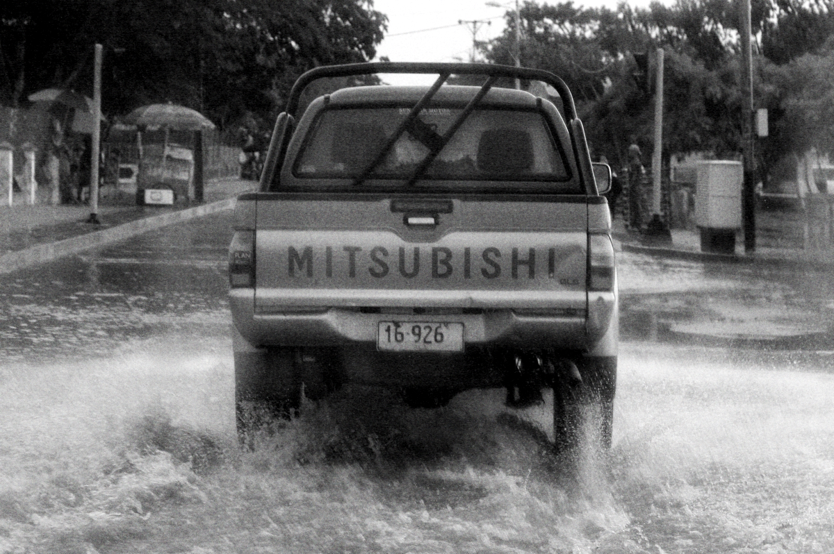 Regenzeit in Dili/Osttimor